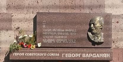 Vardanyan1